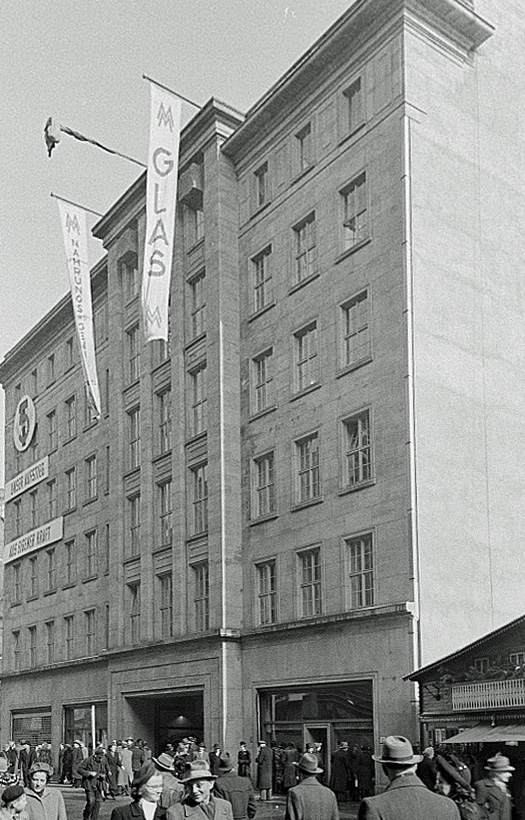 Original image description from the Deutsche Fotothek Außenansicht des Messehofs